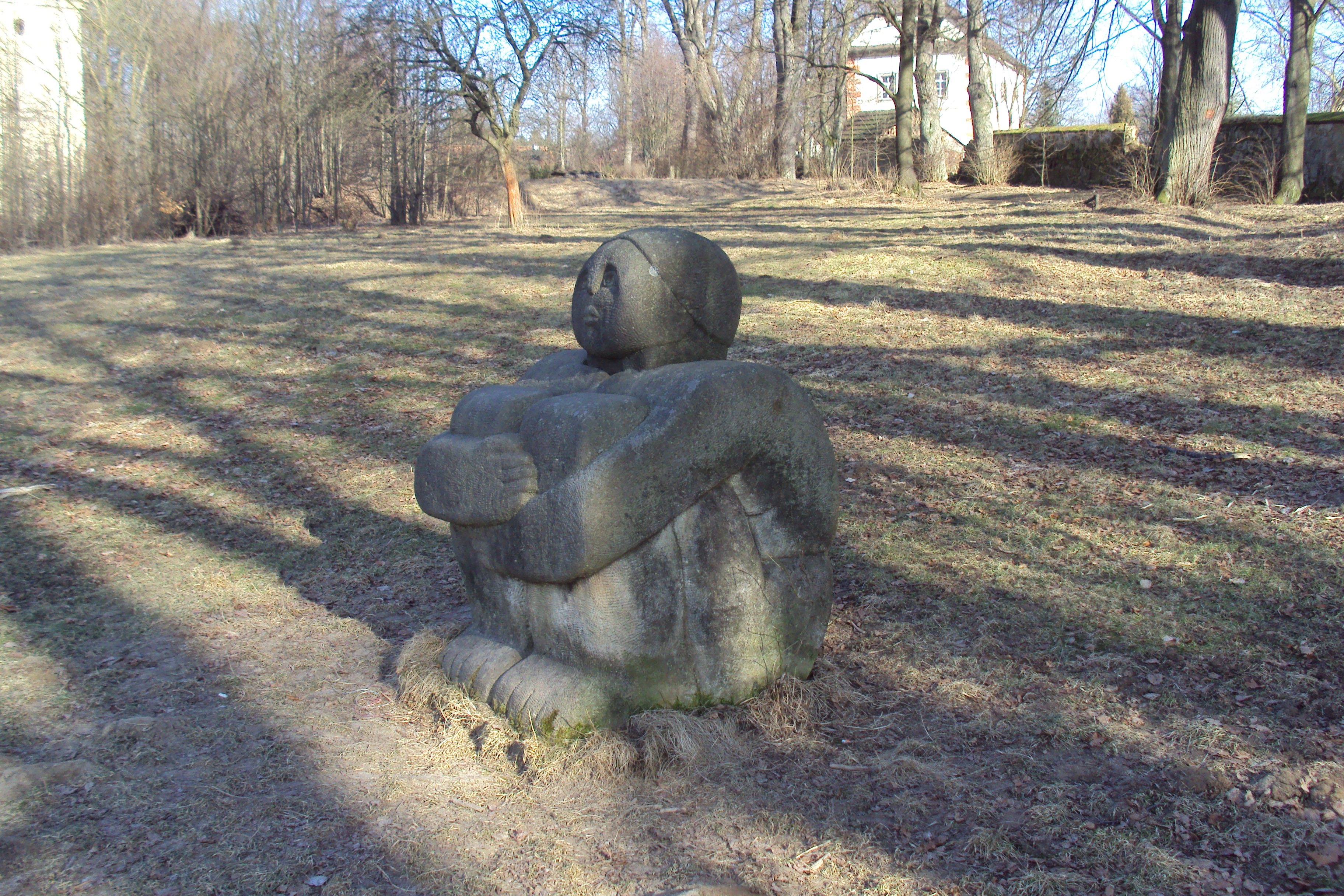 Poblíž zámku Lemberk u Jablonného v Podještědí je řada volně v terénu rozmístěných, nijak neoznačených soch